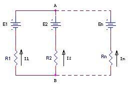 Circuito binodale costituito da generatori di tensione. Il generatore En, a valle degli altri due (E1, E2) indica che possono essere connessi in parallelo ai nodi AB altri generatori, o altri componenti, senza che venga alterata la possibilità di usare il teorema.